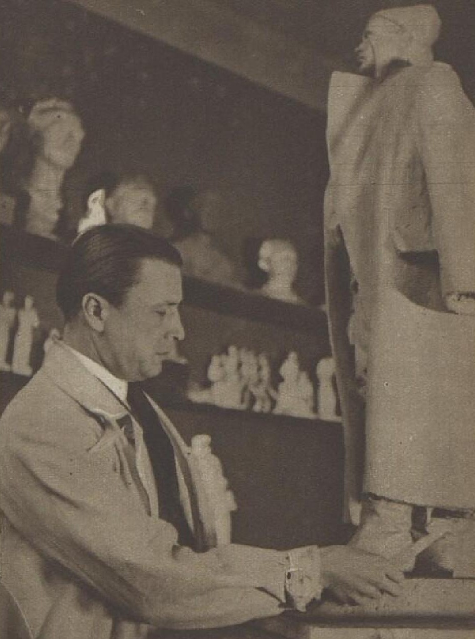 Otakar Švec (1892-1955), český sochař